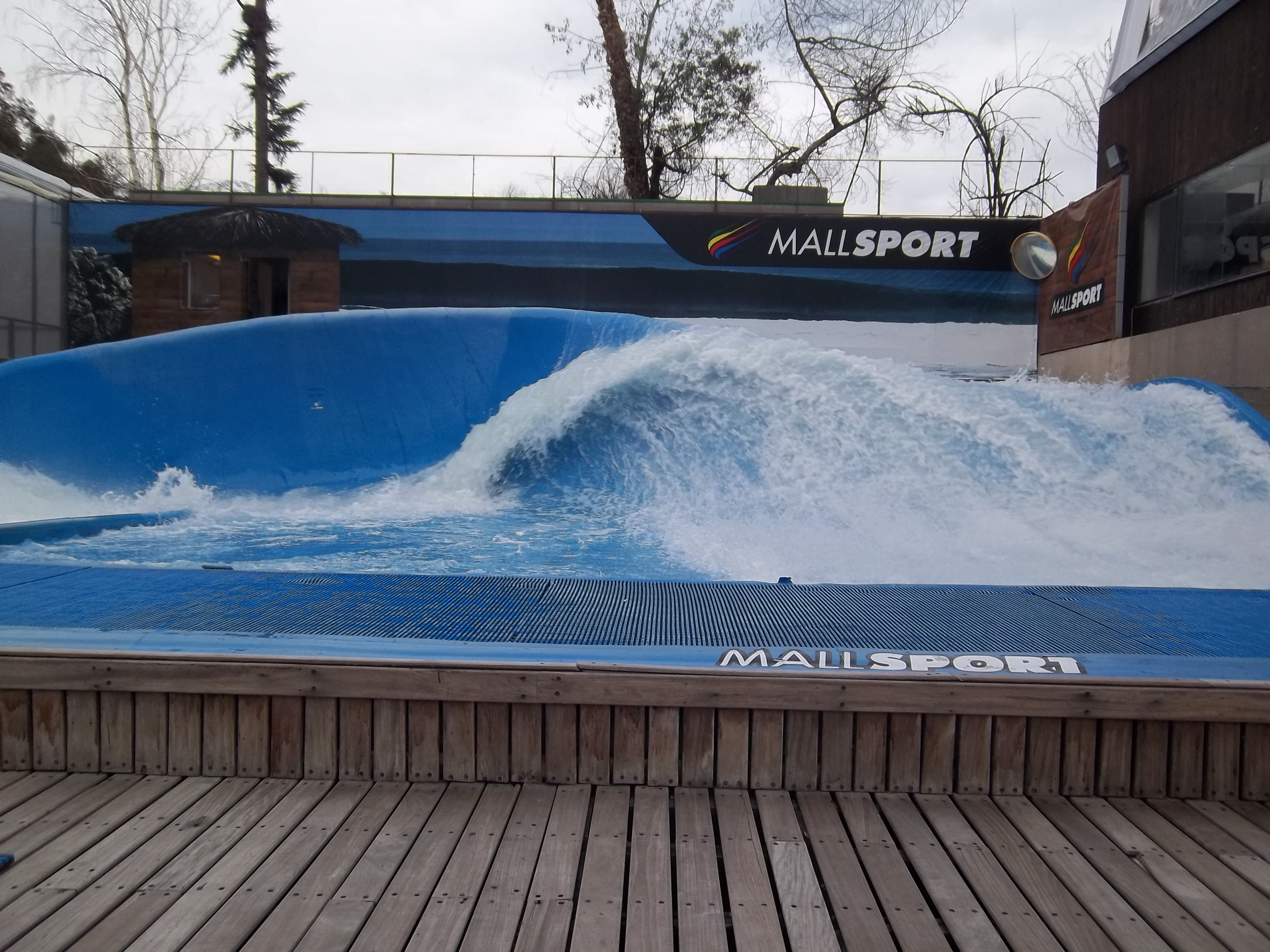 Generador de olas artificiales en el centro comercial Mall Sport, comuna de Las Condes, Santiago de Chile, Región Metropolitana, Chile.